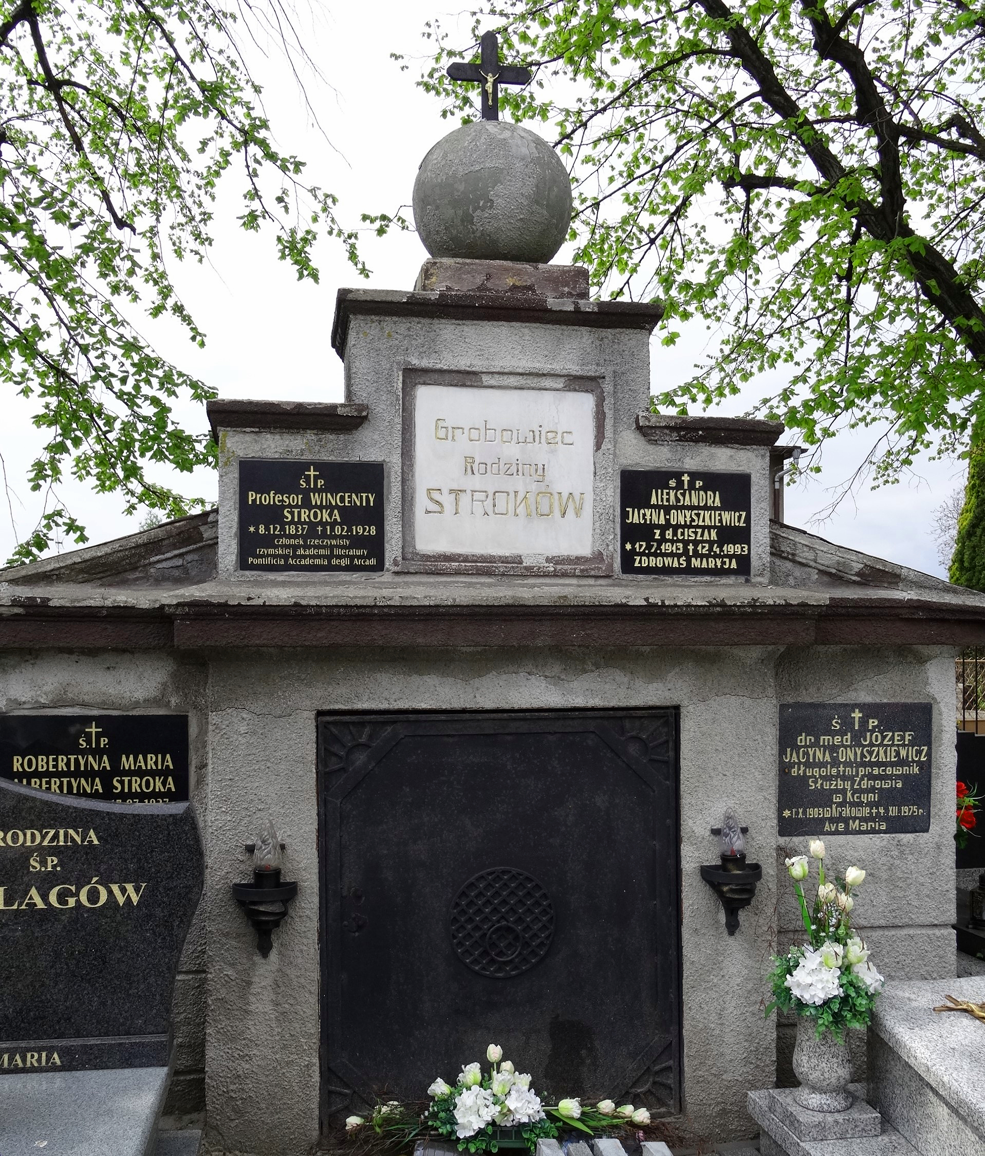 Grobowiec Stroków w Pleszewie, miejsce pochówku profesora Wincentego Stroki